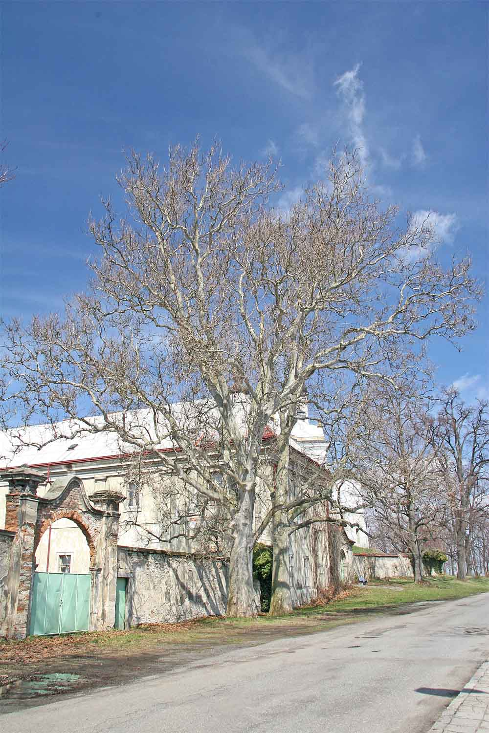 Alej pěti památných platanů javorolistých v Luži, okres Chrudim